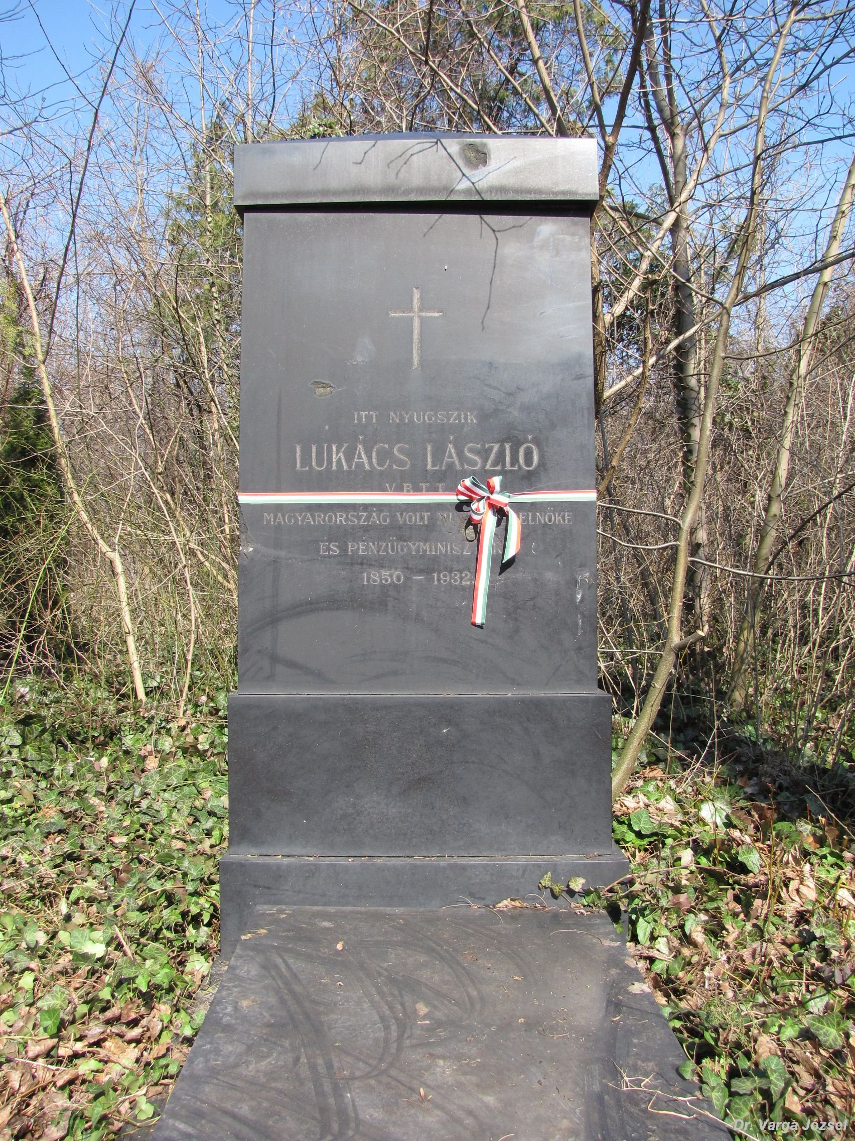 Lukács László sírja Budapesten. Kerepesi temető: 46-1-99.